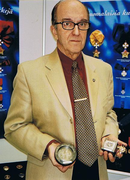 Taiteilija ja heradikko